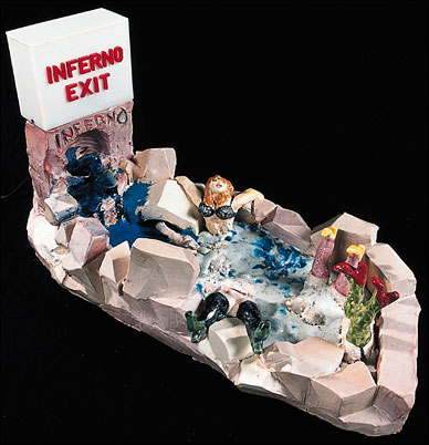 Ici on nage autrement qu'au Serchio, 2002, Email, oxyde, verre fondu sur terre rouge et blanche, couverte mate, caisson plexiglas lumineux, 31 x 26 x 59 cm